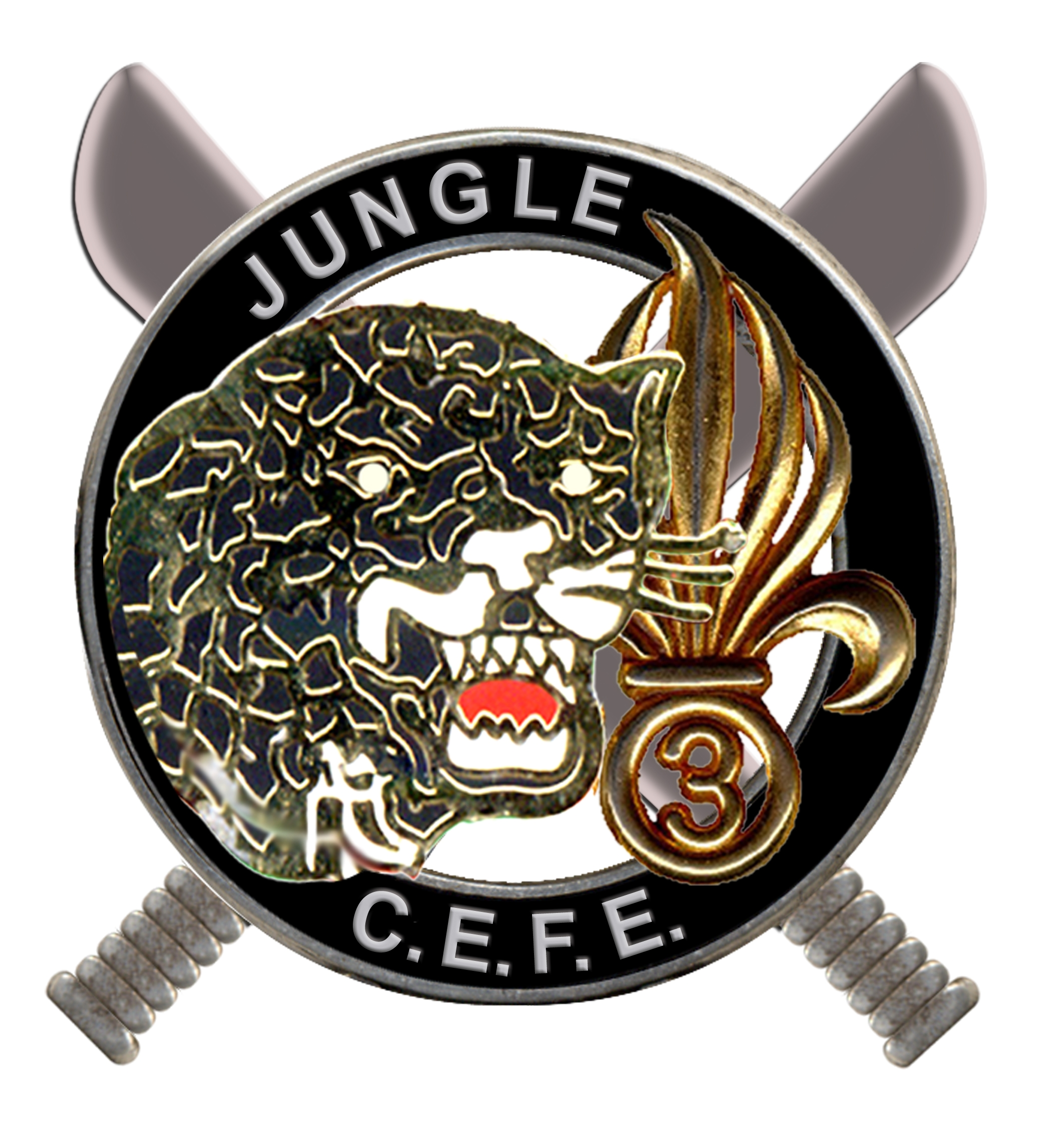 Insigne métallique du stage "combat en jungle" dispensé au 3e Régiment étranger d'infanterie en Guyane française